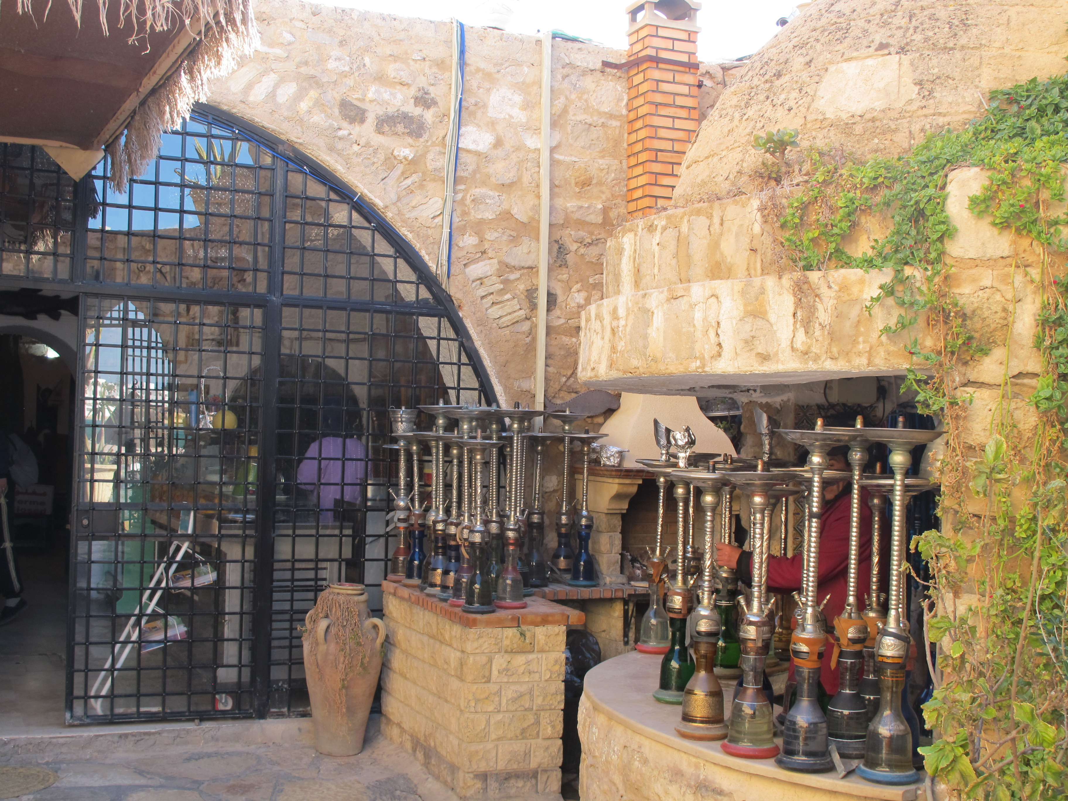 Wasserpfeifen in einem Cafe in Hammamet Tunesien